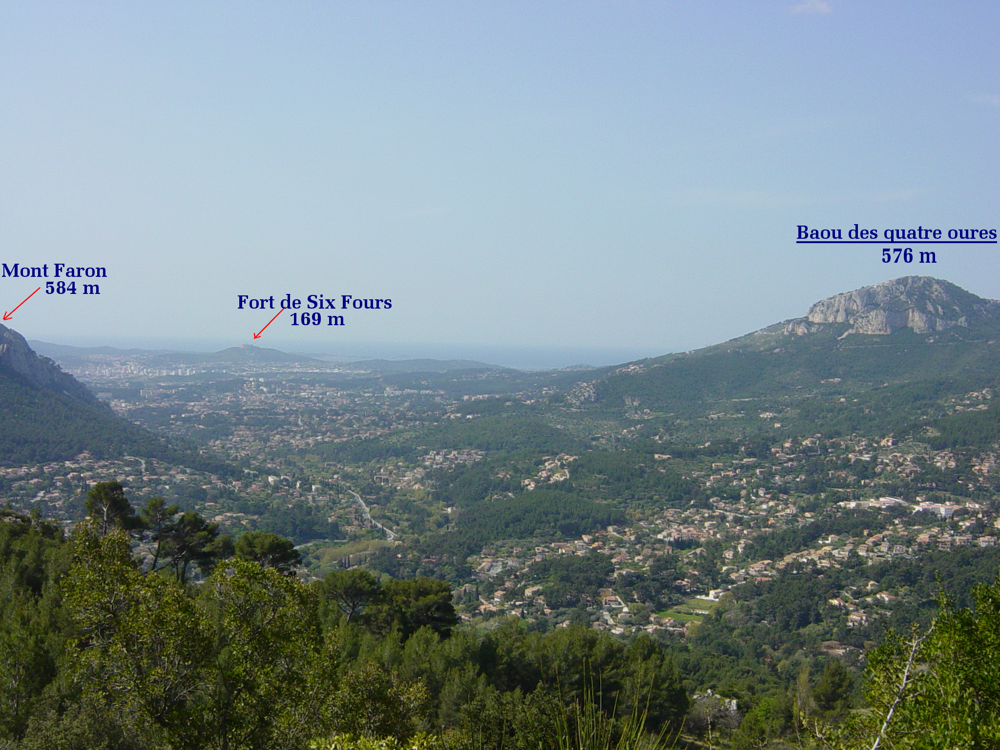 En redescendant du Mont Combe vers Toulon